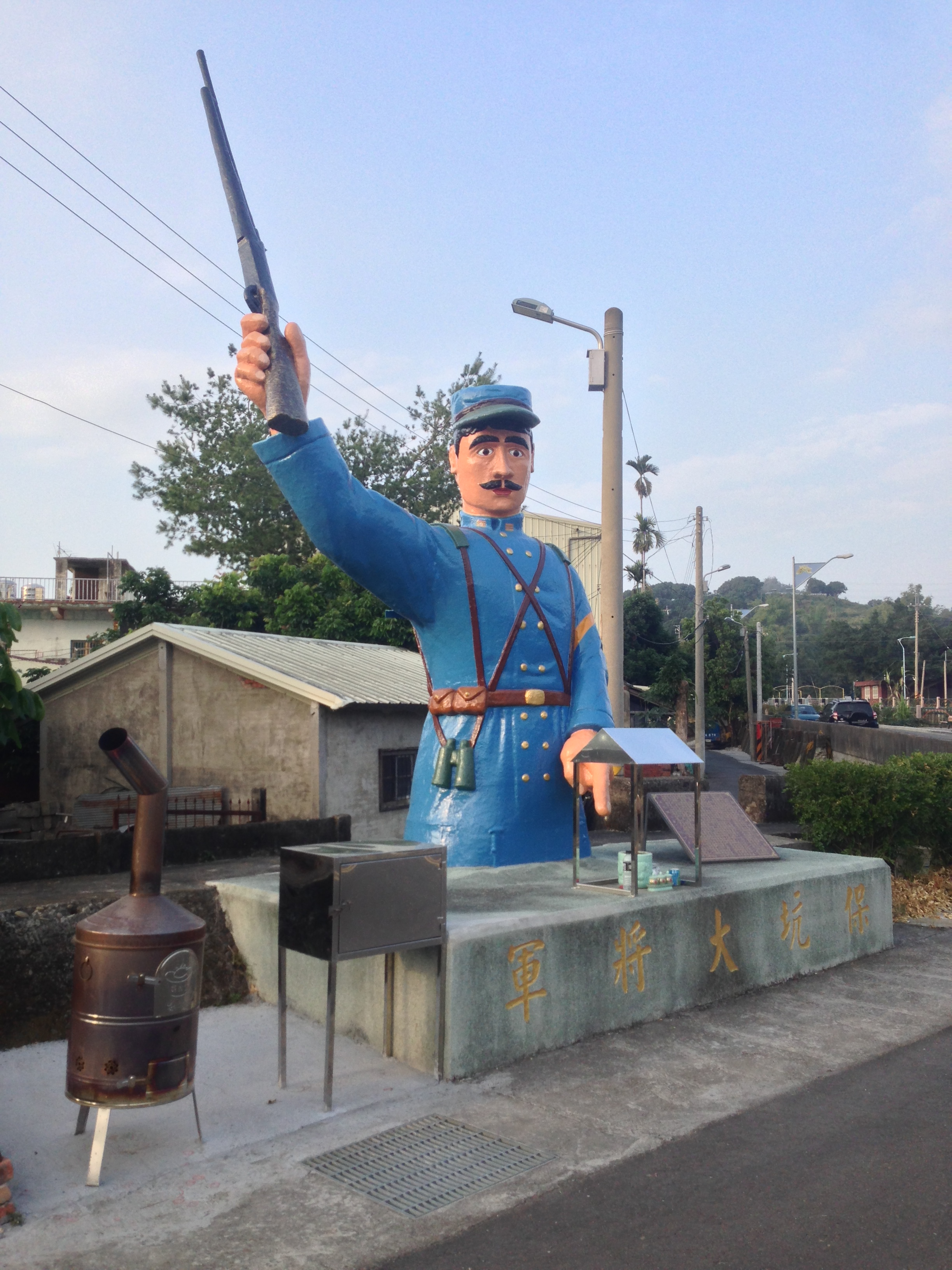 保坑大將軍，原先是臺灣藝人高凌風在臺北市開設的夜店「石頭族樂園」的擺飾物，後來搬至雲林縣斗六市湖山里檨仔坑。